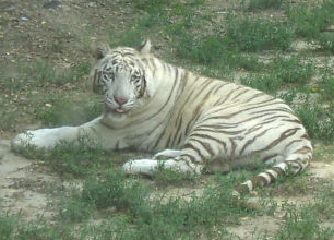 紅山森林動物園 白虎 2004年6月3日撮影 撮影者：権作 参照：